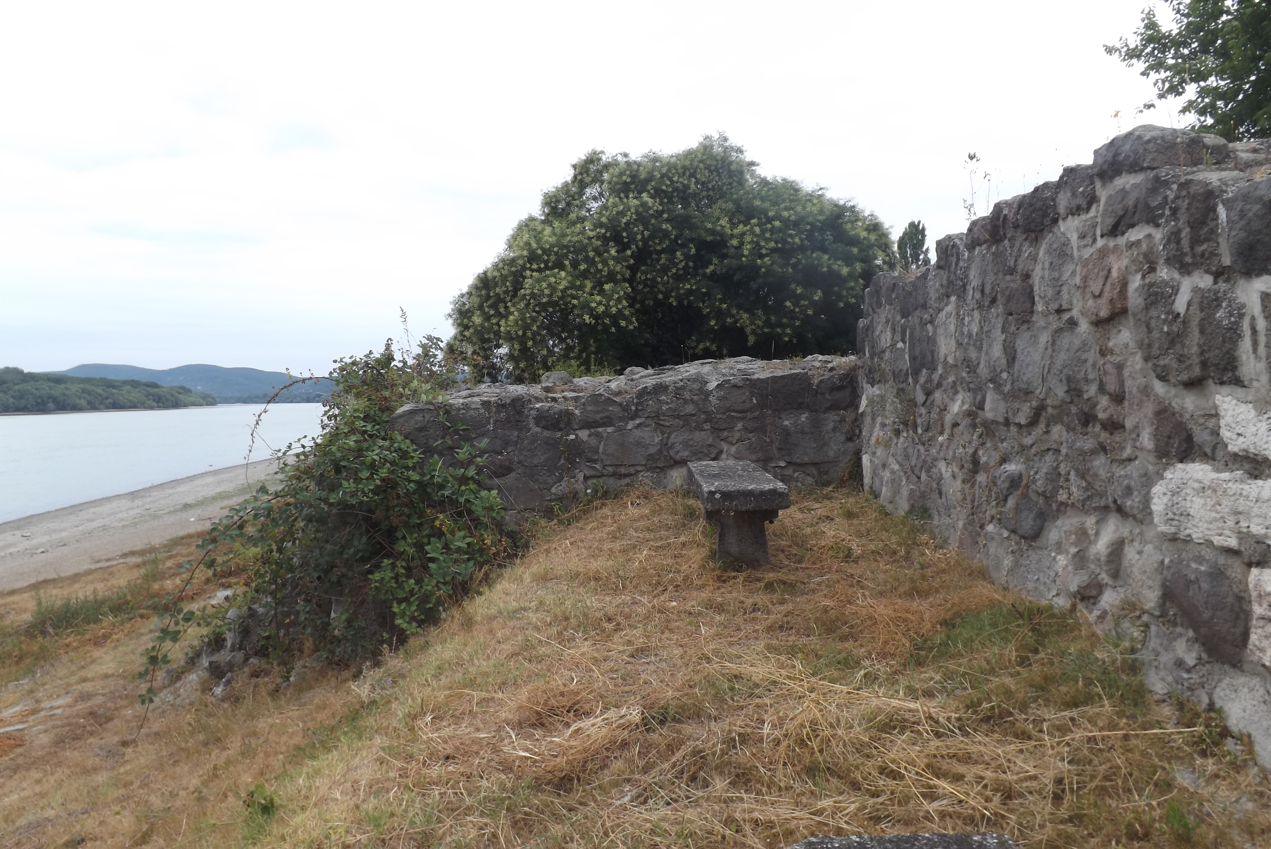 Római hídfőállás (erőd) maradványai Verőcén